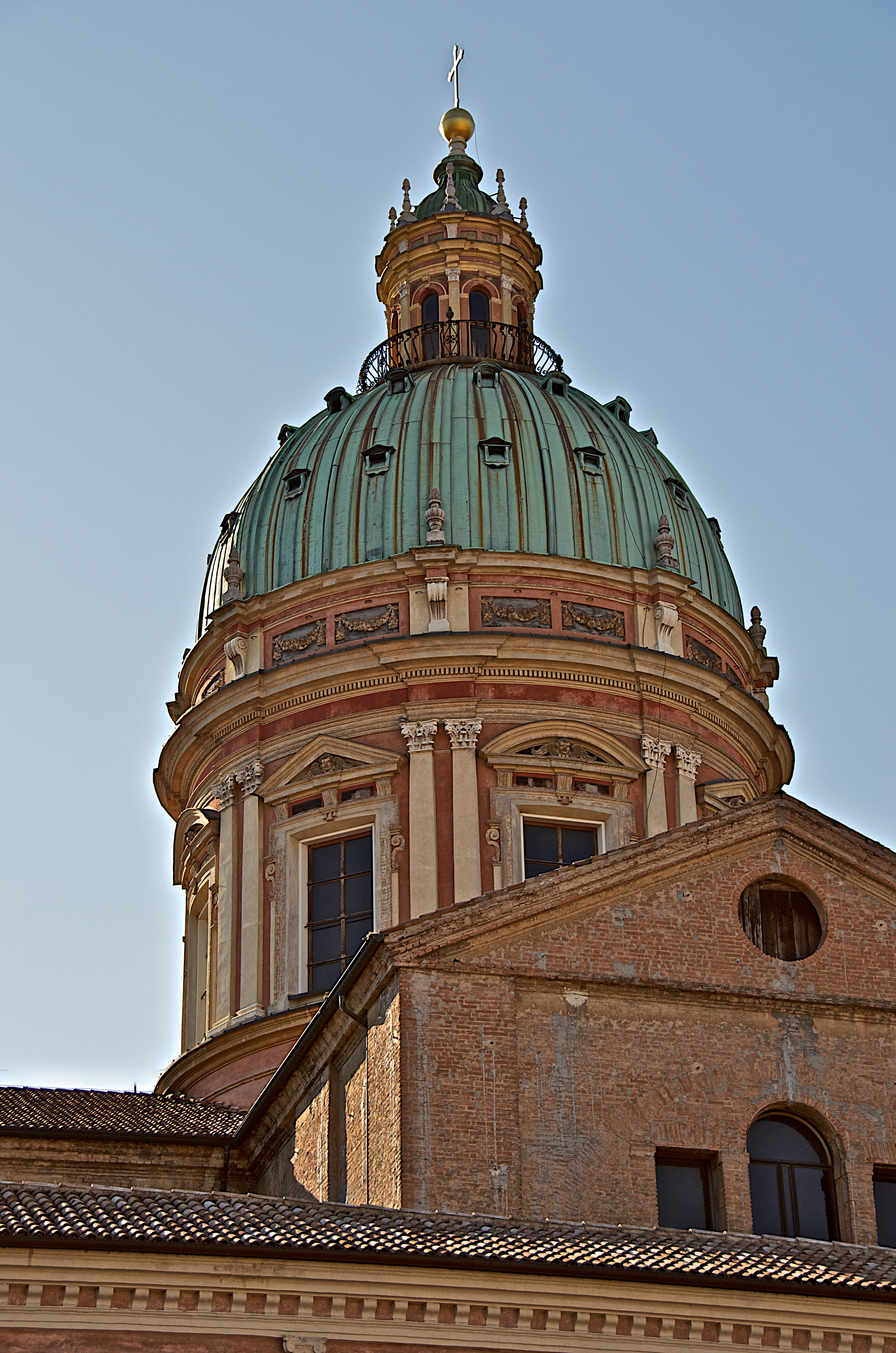 Chiesa di San Pietro This is a photo of a monument which is part of cultural heritage of Italy.